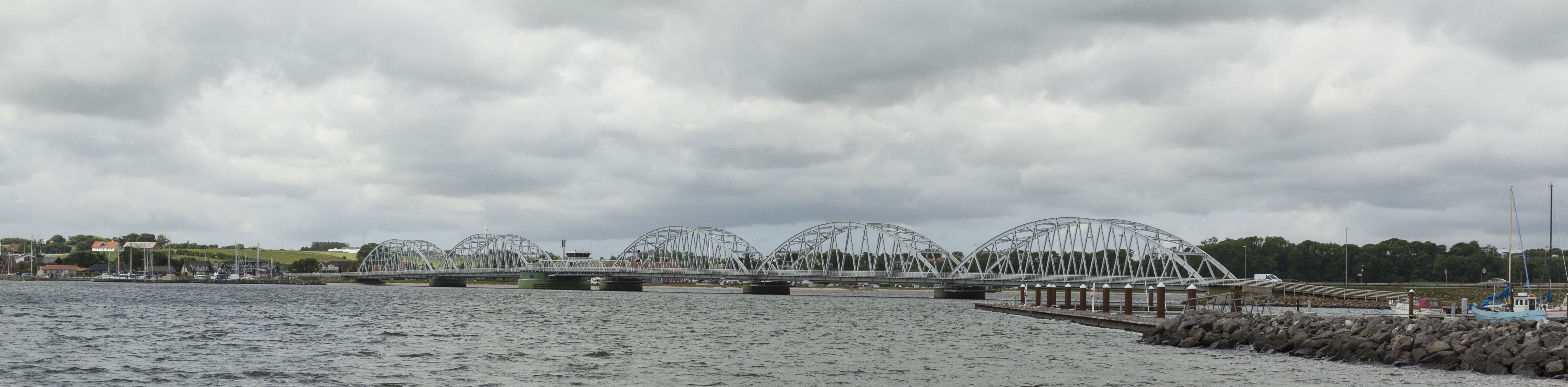 Vildsundbroen juni 2017 set fra Mors